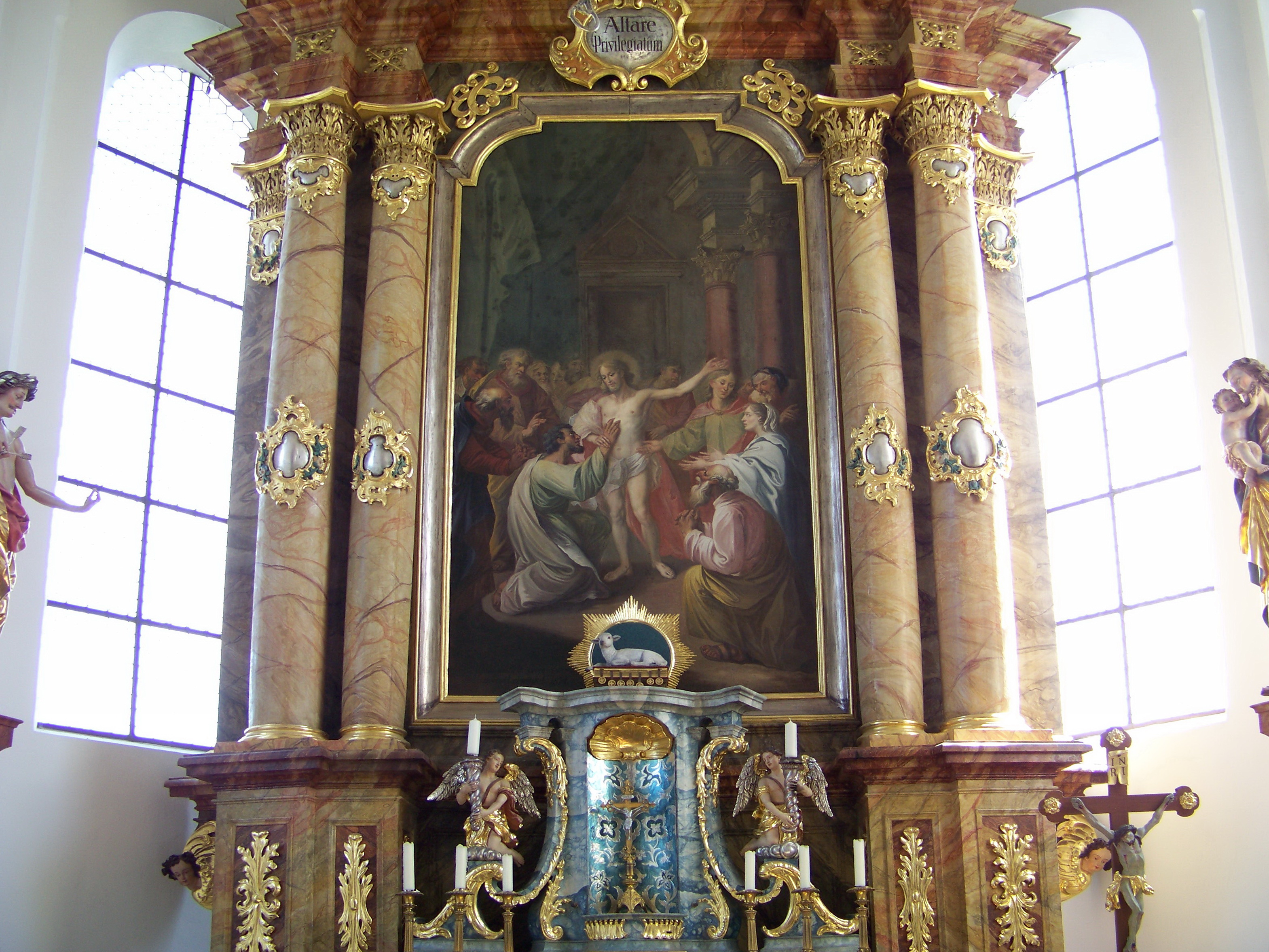 Adlkofen, Hauptstraße 9. Katholische Pfarrkirche St. Thomas. Dreischiffige Basilika. Barocke Anlage mit eingezogenem Chor. Hochaltar mit vier Säulen. Das Altarbild zeigt den zweifelnden Apostel Thomas, der seinen Finger in die Wunden Jesu legt. Auffällig ist die blaue Färbung des Tabernakels.